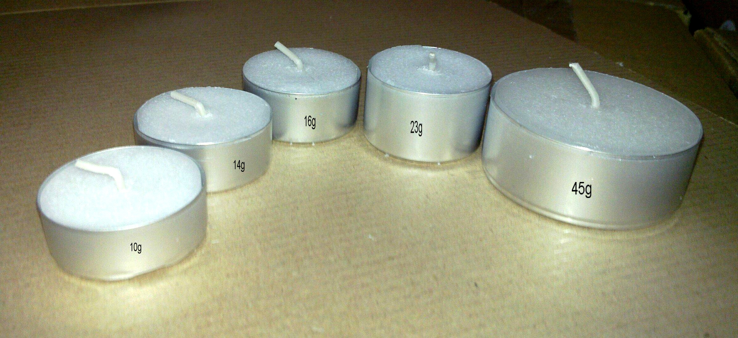 Čajové svíčky podle hmotnosti